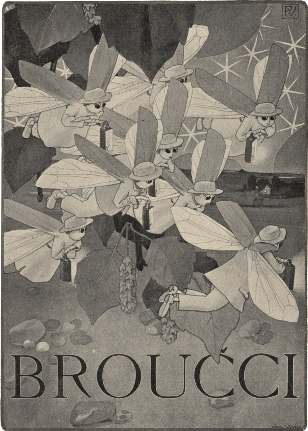 Obrázek na straně 2 knihy Broučci.